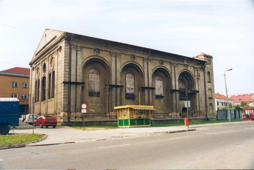 Synagoga w Dąbrowie Tarnowskiej położona przy ulicy Berka Joselewicza.